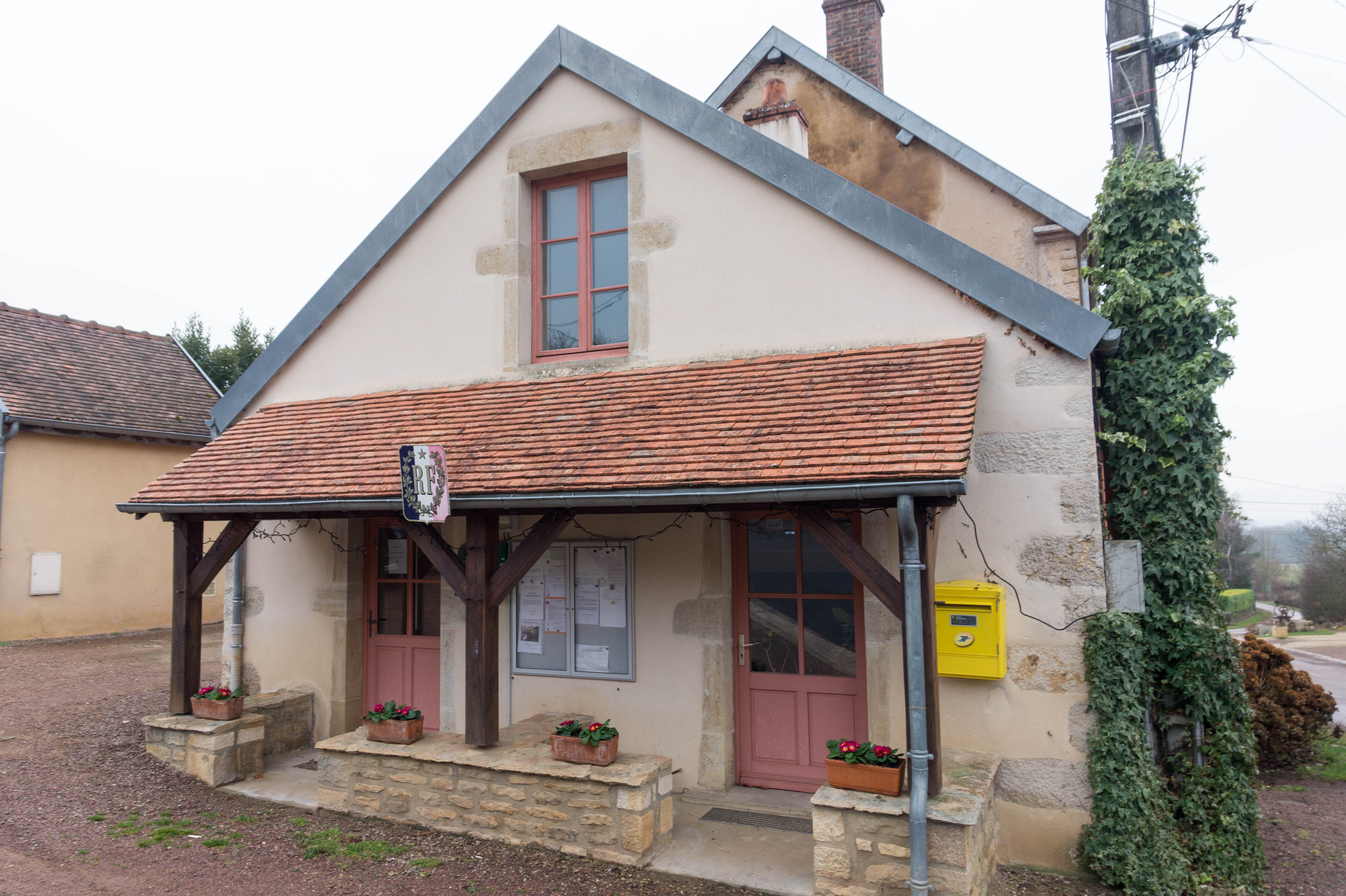 Mairie de Velogny